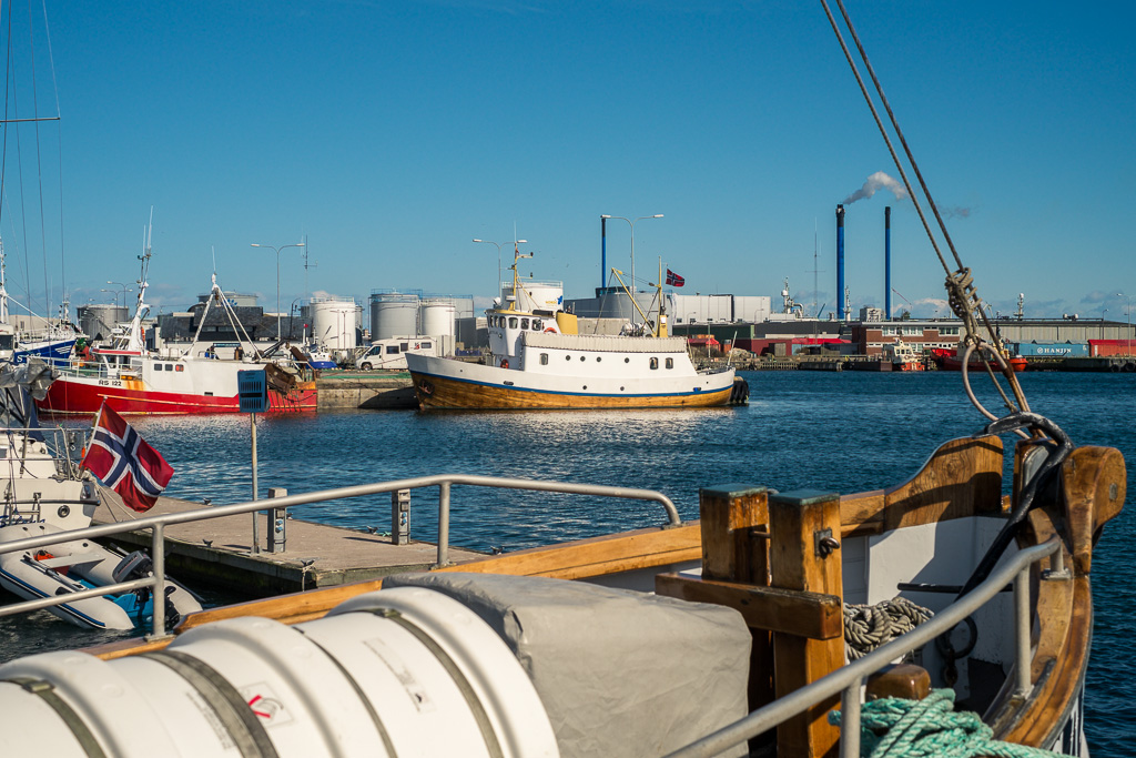 Skagen Harbour, Jutland, Denmark